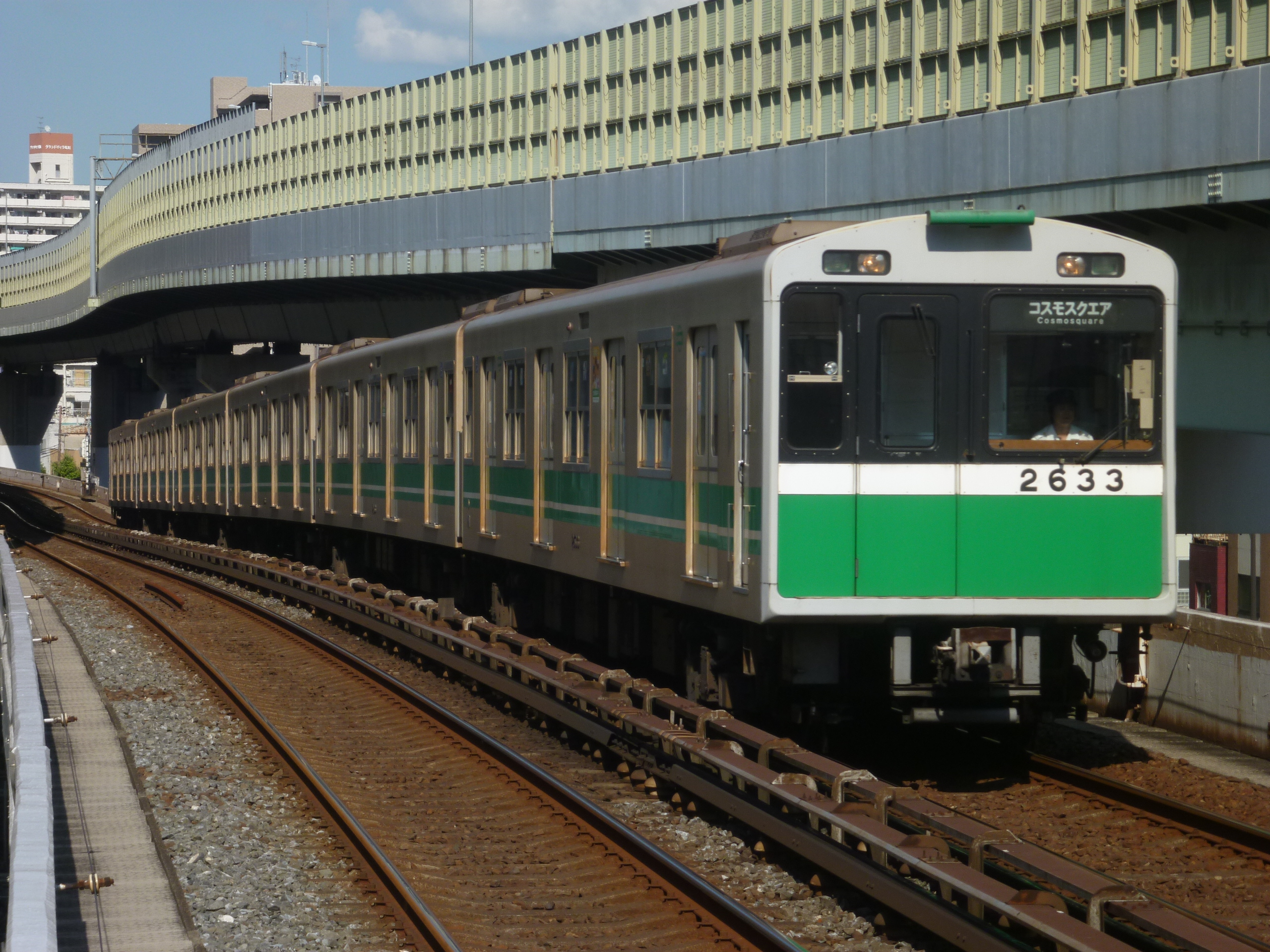 2012年8月20日、弁天町駅にて撮影。